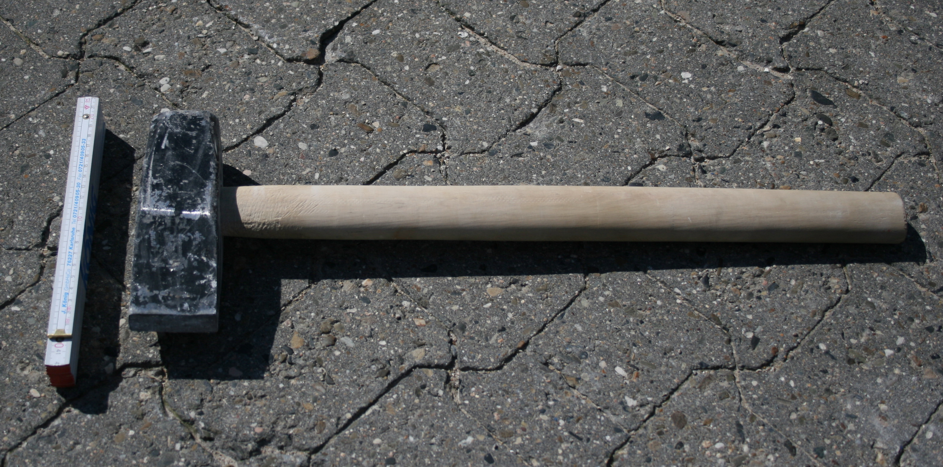 Setzhammer